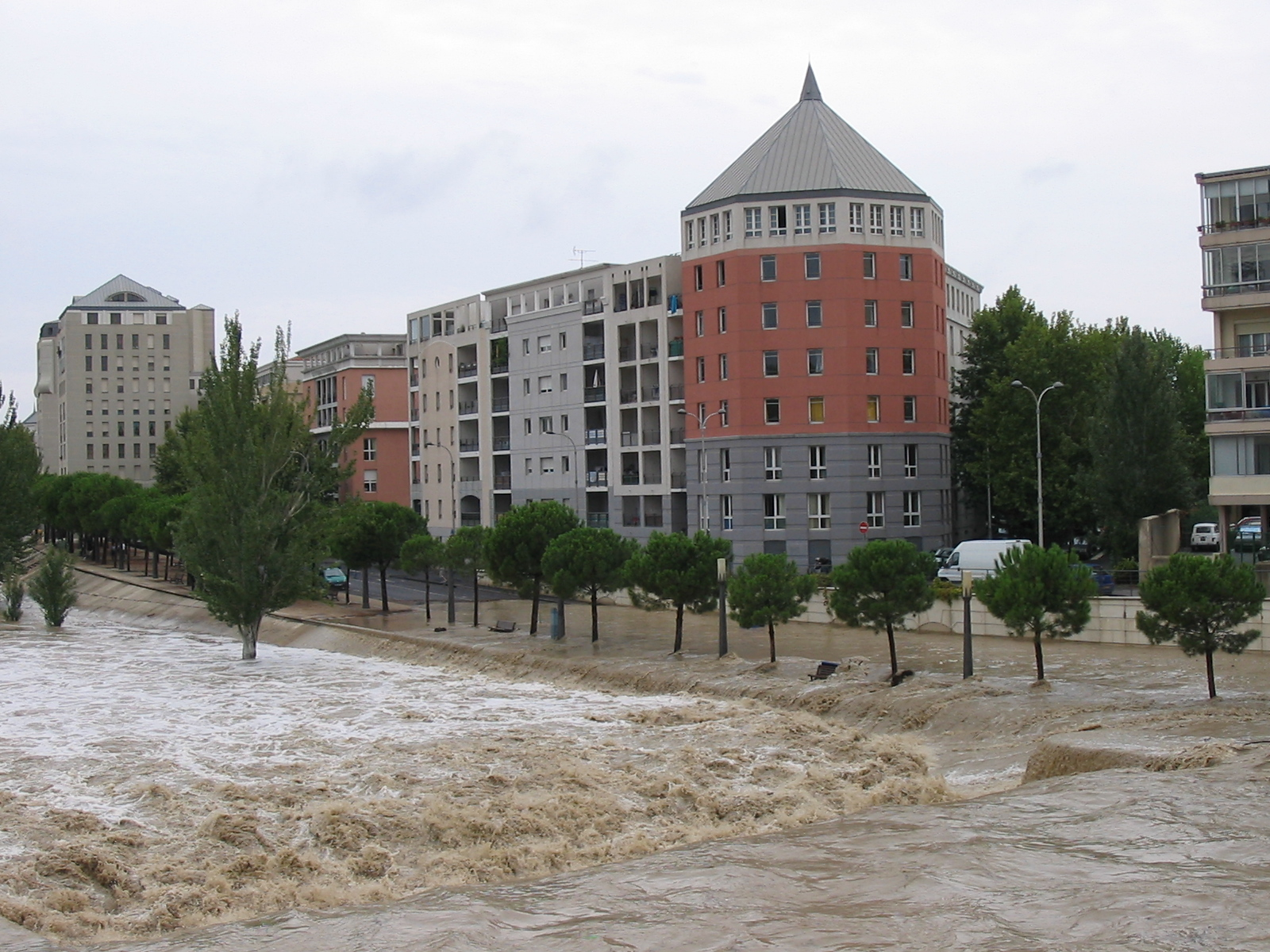 Photo du Lez à Montpellier (Hérault) en crue prise lors de l'épisode cévenol du 6 septembre 2005.